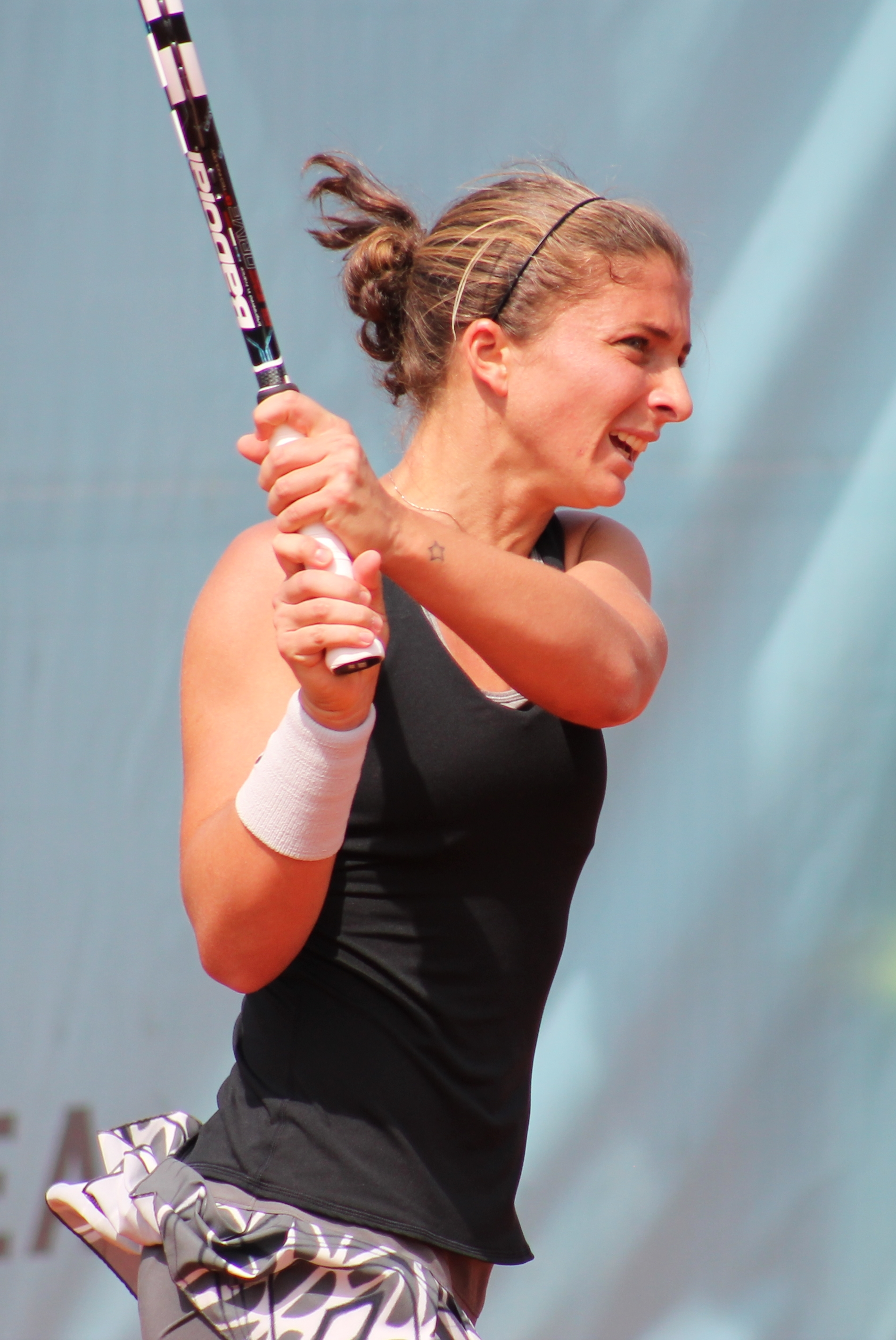 Errani MA14 (10)